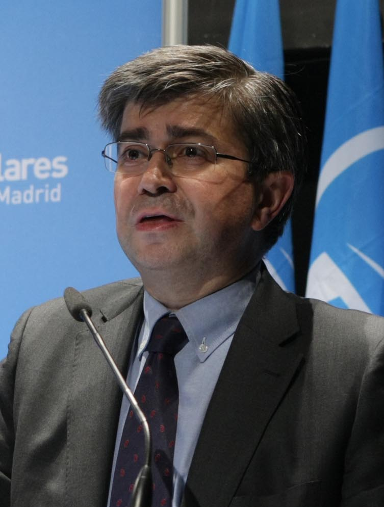 La presidenta del PP de Madrid, Esperanza Aguirre, ha clausurado la Convención de candidatos municipales del PP de Madrid, a quienes ha animado a conversar "ciudadano a ciudadano" para explicarles que nuestro proyecto, el del Partido Popular, es "el mejor". Si te has hecho una foto con la presidenta, mira aquí: Esta convención se ha celebrado el jueves 14 y el viernes 15 en Alcorcón. En la primera jornada han intervenido también el candidato del PP en Alcorcón, David Pérez, el diputado nacional Baudilio Tomé, el secretario general de PP Madrid, Paco Granados y el alcalde de Alcalá de Henares y candidato a la reelección, Bartolomé González.